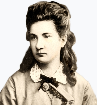 Мария Васильевна Гортынская (Мария Васильевна Павлова) в 1874 году